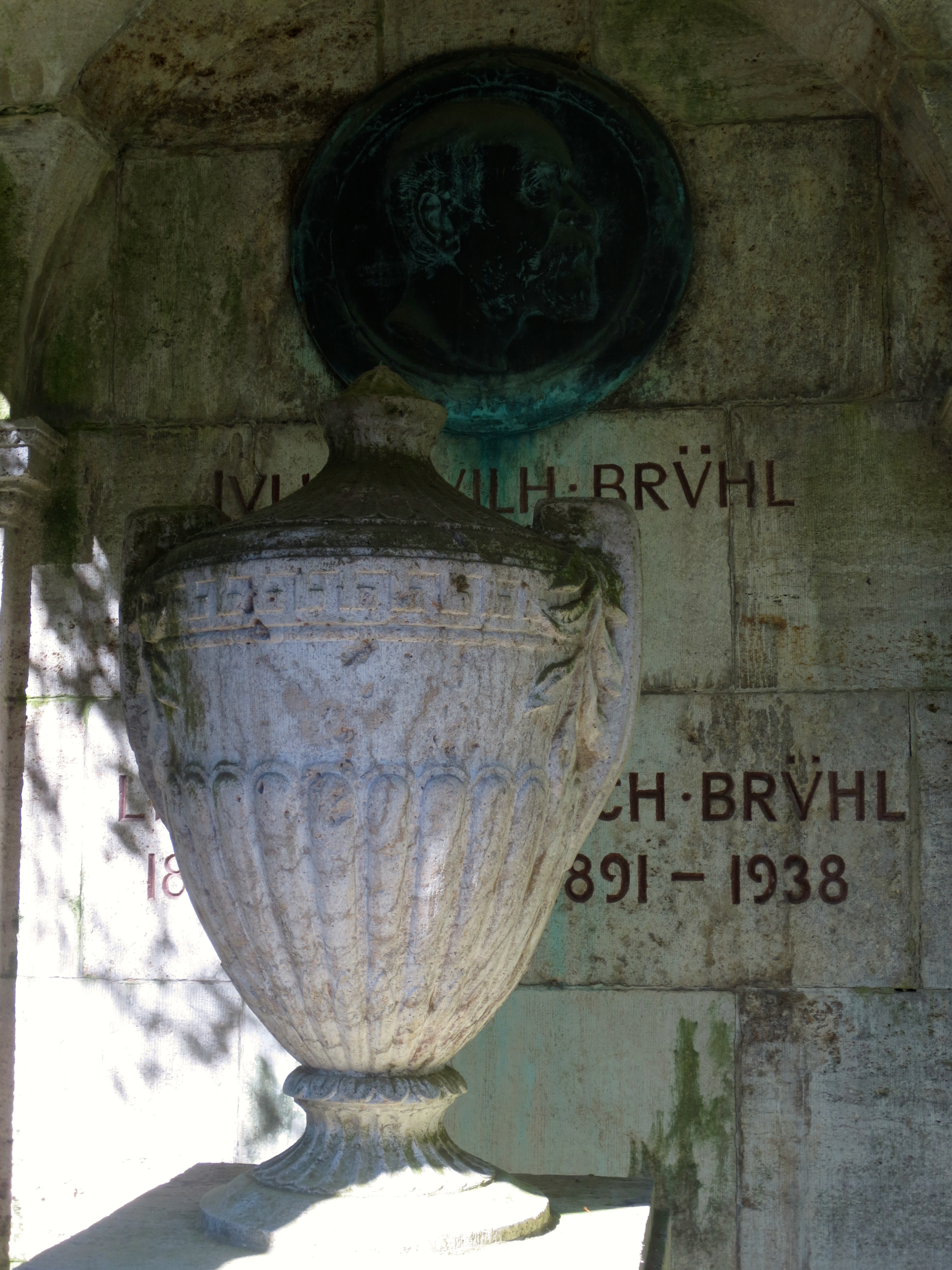 Grabmal Julius Wilhelm Brühl Bergfriedhof (Heidelberg), Blick auf die Rückwand und Gestaltung des Innenraumes